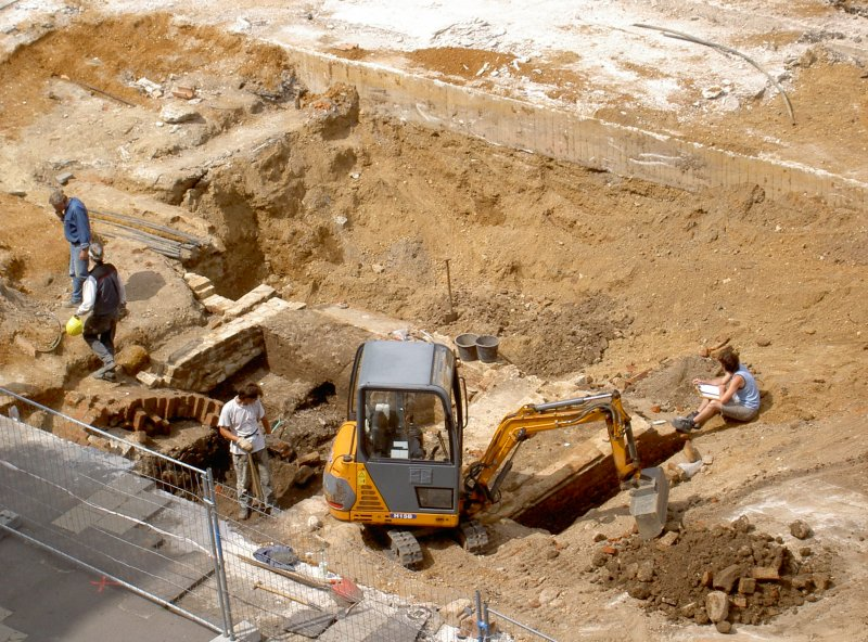 Ausgrabungen des Landesamtes für Archäologie am Brühl.